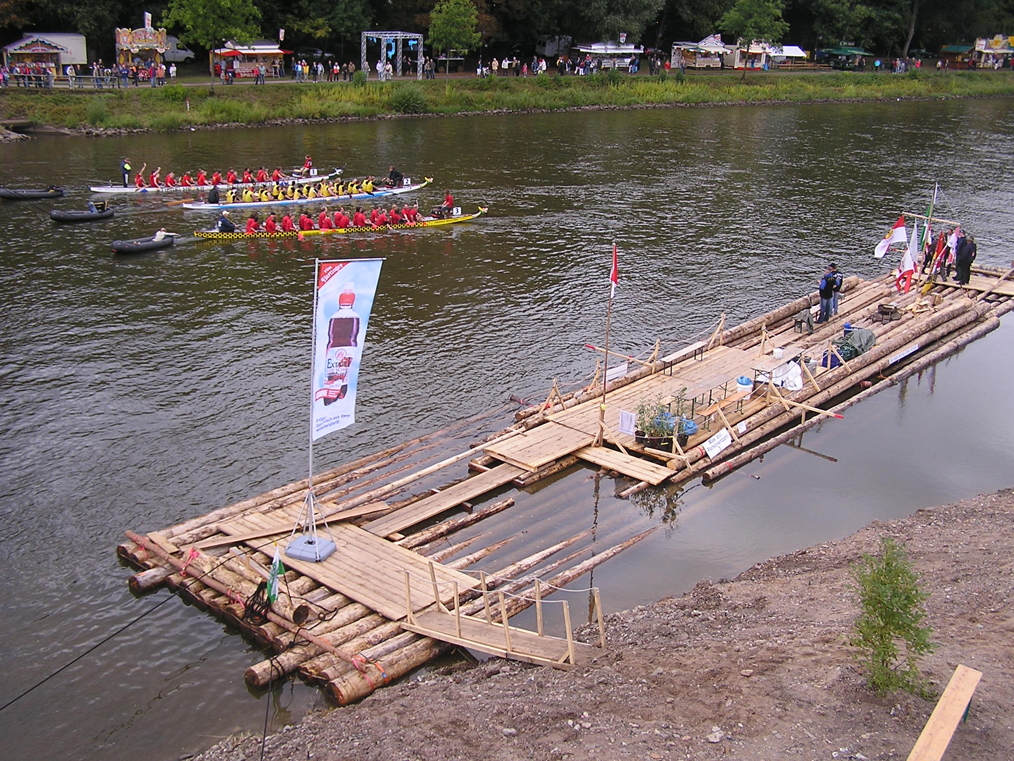 Das Blauer Band der Weser, Start vom Drachenbooten und am Ufer der Weser das Weserfloß.